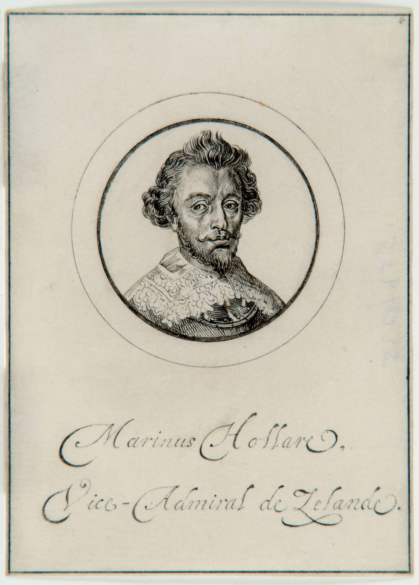 vice Admiraal Marinus Hollaer